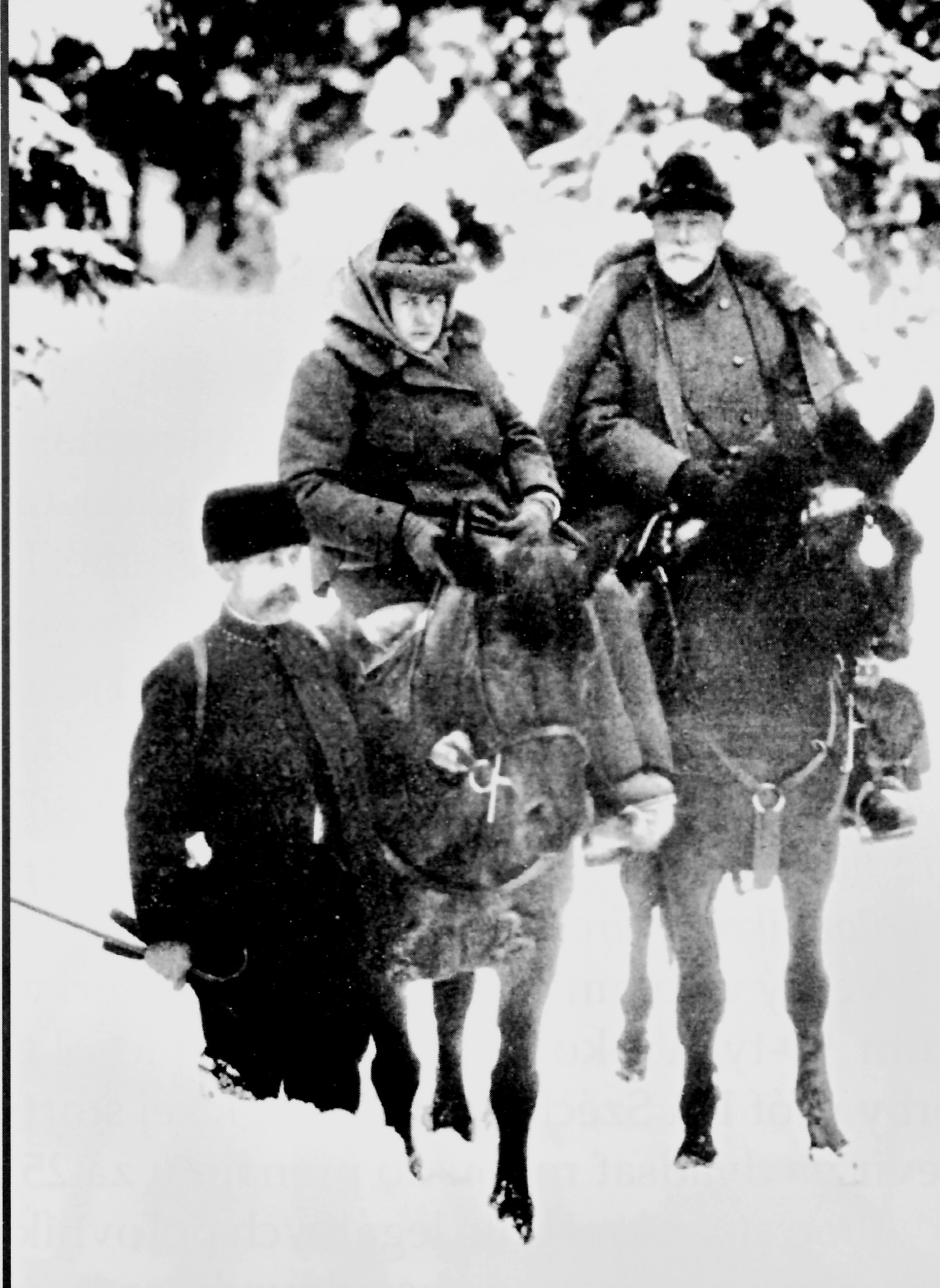 Christian Kraft Hohenlohe a jeho družka Otília Lubraniec - Dambska. Bol majiteľom Tatranskej Javoriny